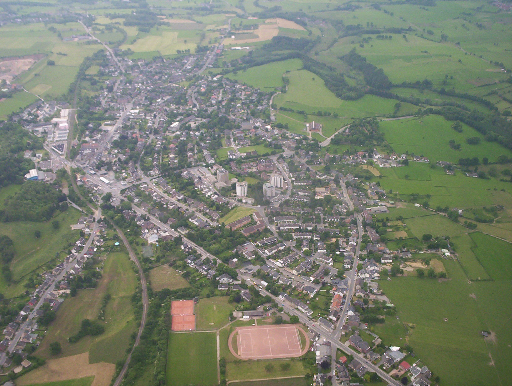 Luftaufnahme des Ortes Walheim (NRW)